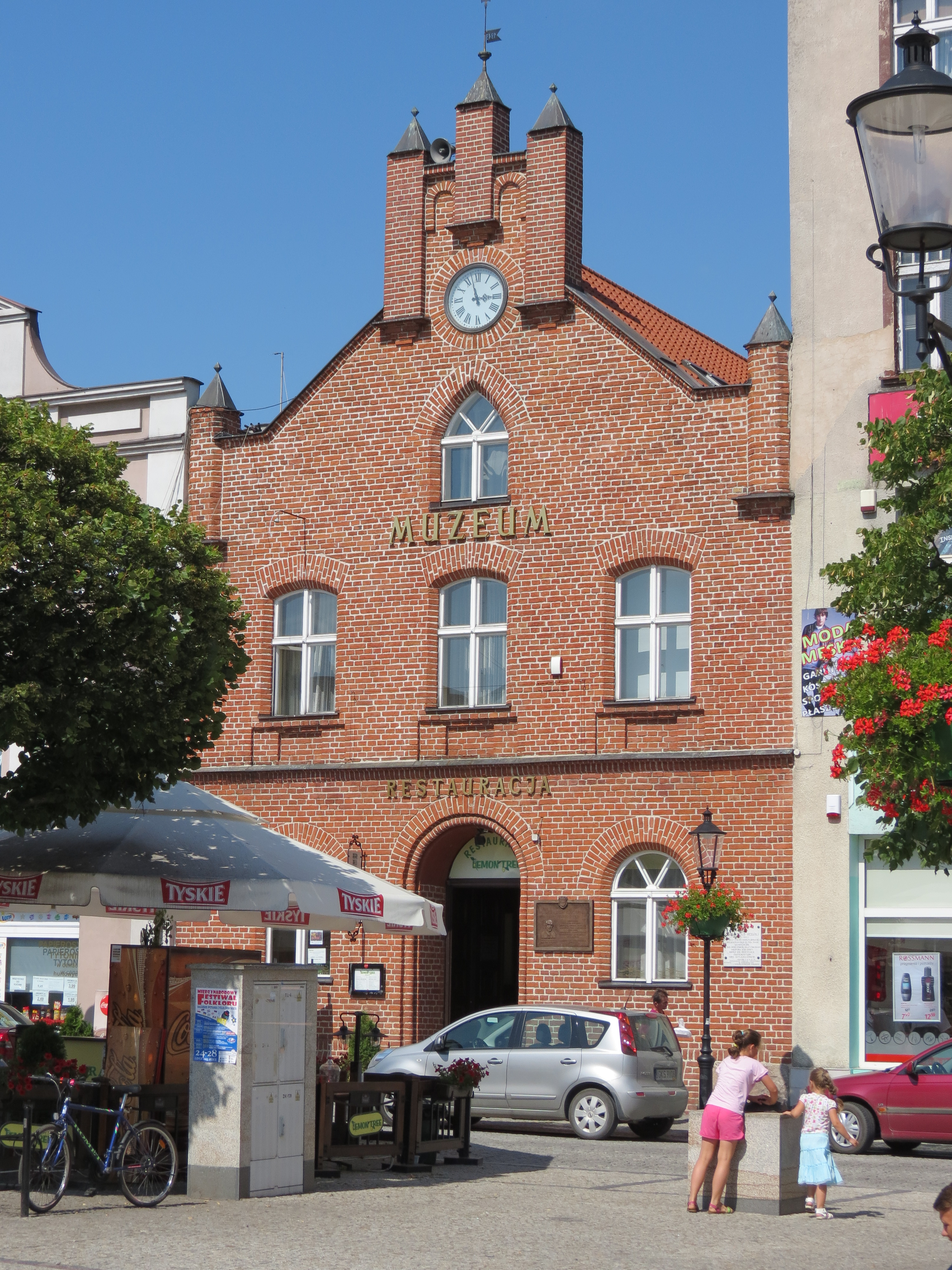 Kościerzyna, ratusz, 1843